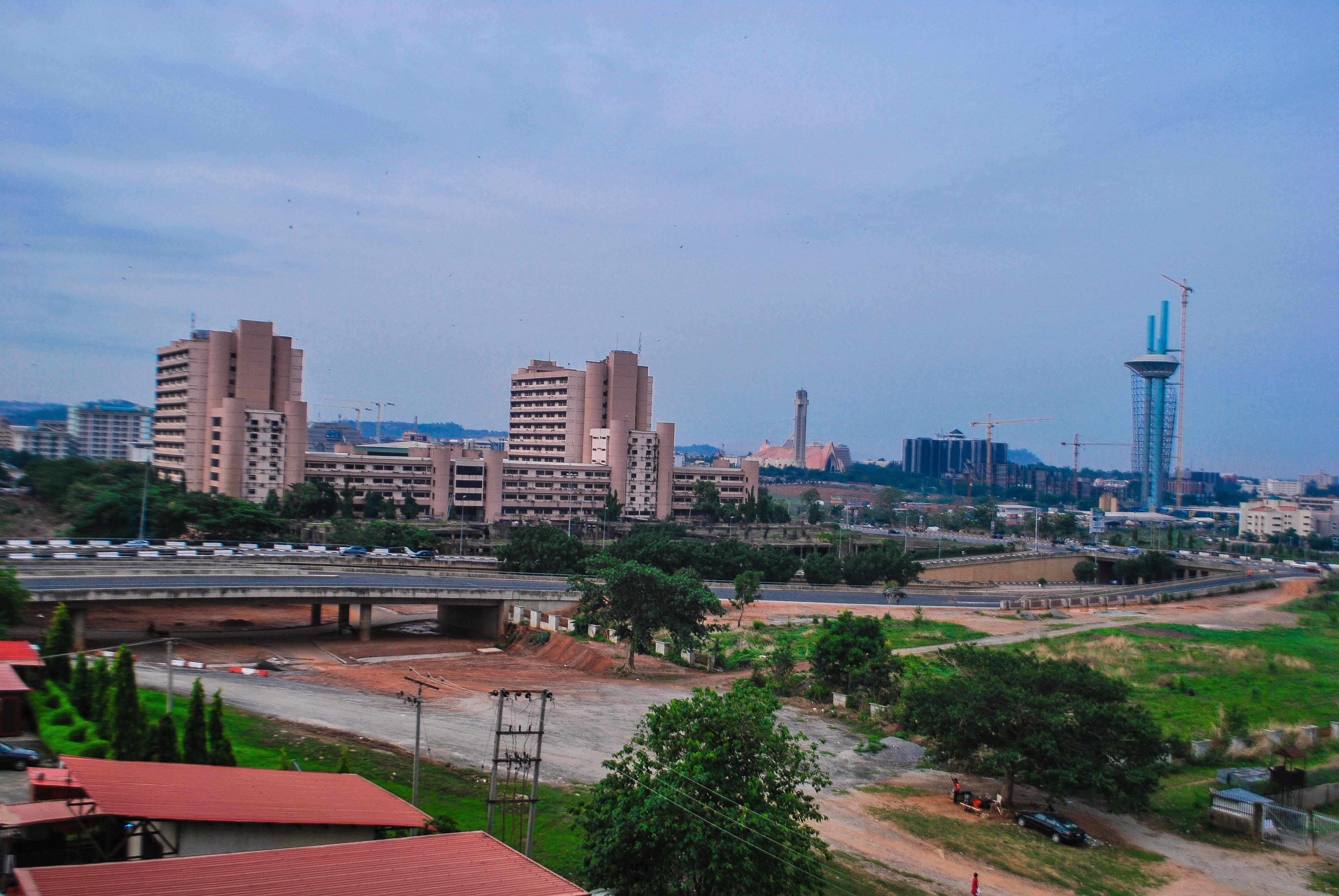 Federal Secretariat